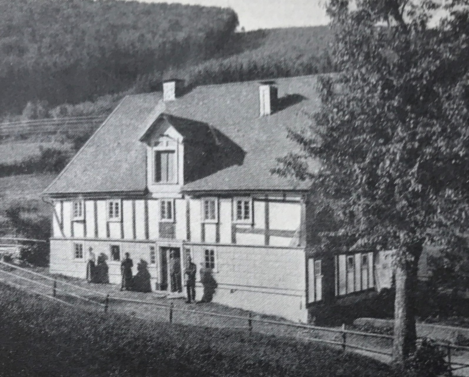 Geburtshaus von Johann Heinrich Jung-Stilling von 1730 in Grund bei Hilchenbach